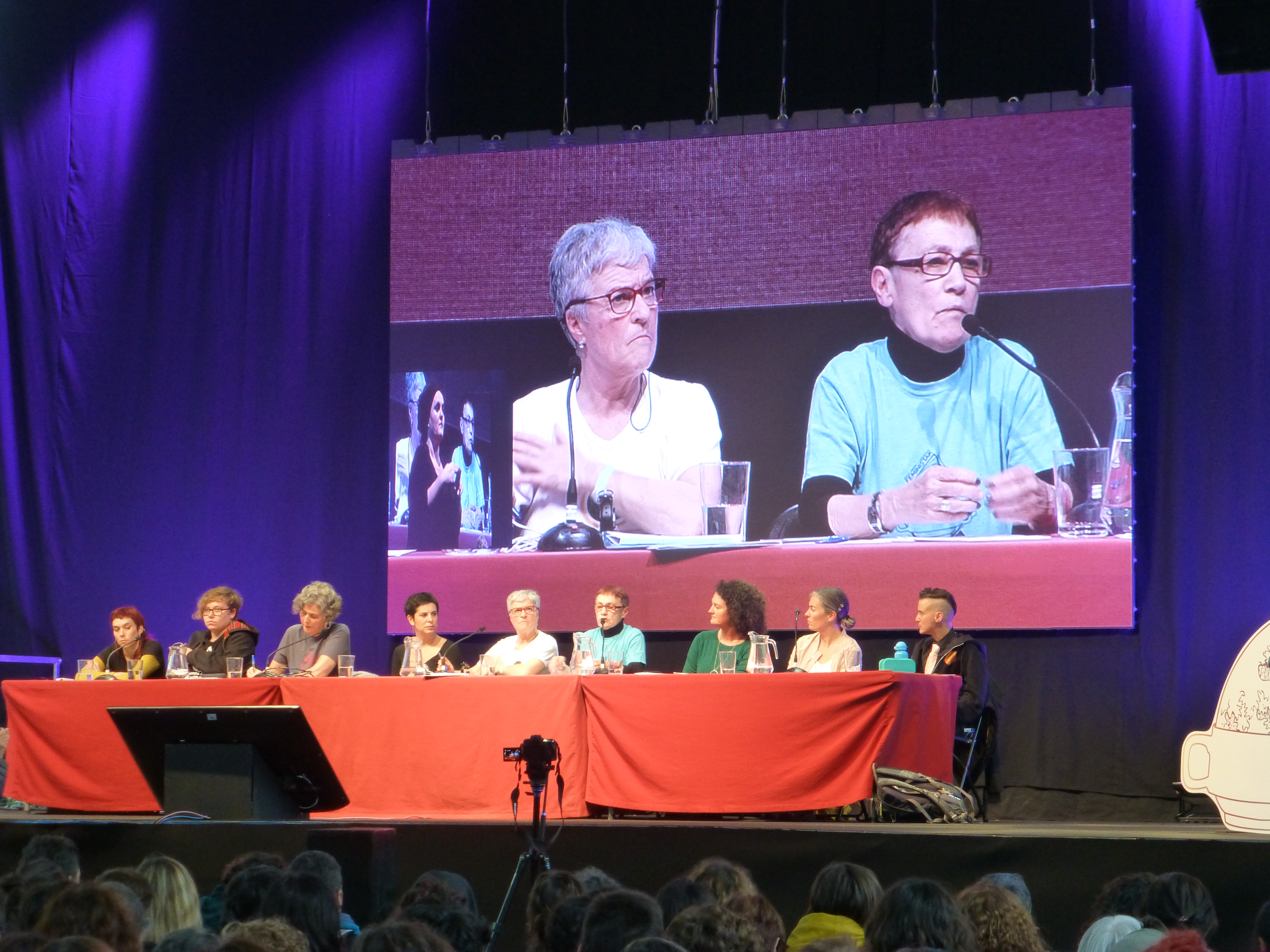 Begoña Zabala, Euskal Herriko Jardunaldi Feministetetan. 2. eguneko arratsaldeko mahai inguru zentralean Emakume Internazionalistak kolektiboaren ordezkari: Indarkeriarik gabeko bizitzak eraikitzen.